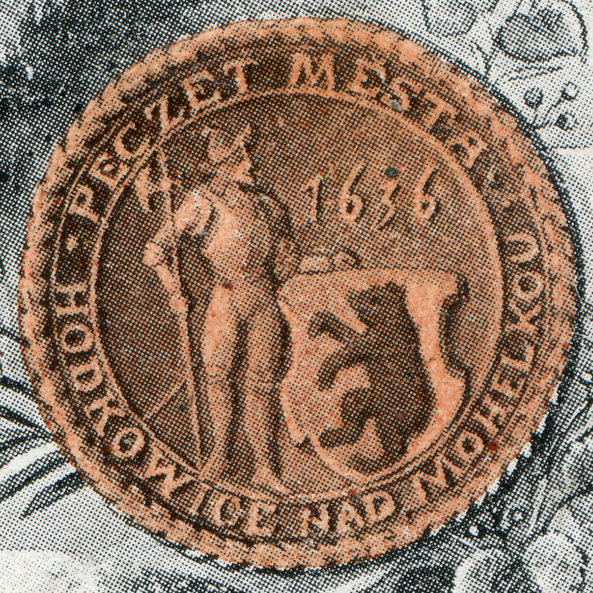 Hodkovice nad Mohelkou - pohlednice, Pozdrav z Hodkovic a okolí, pečeť (1636). Srv. File:Hodkovice nad Mohelkou - pohlednice, Pozdrav z Hodkovic a okolí.